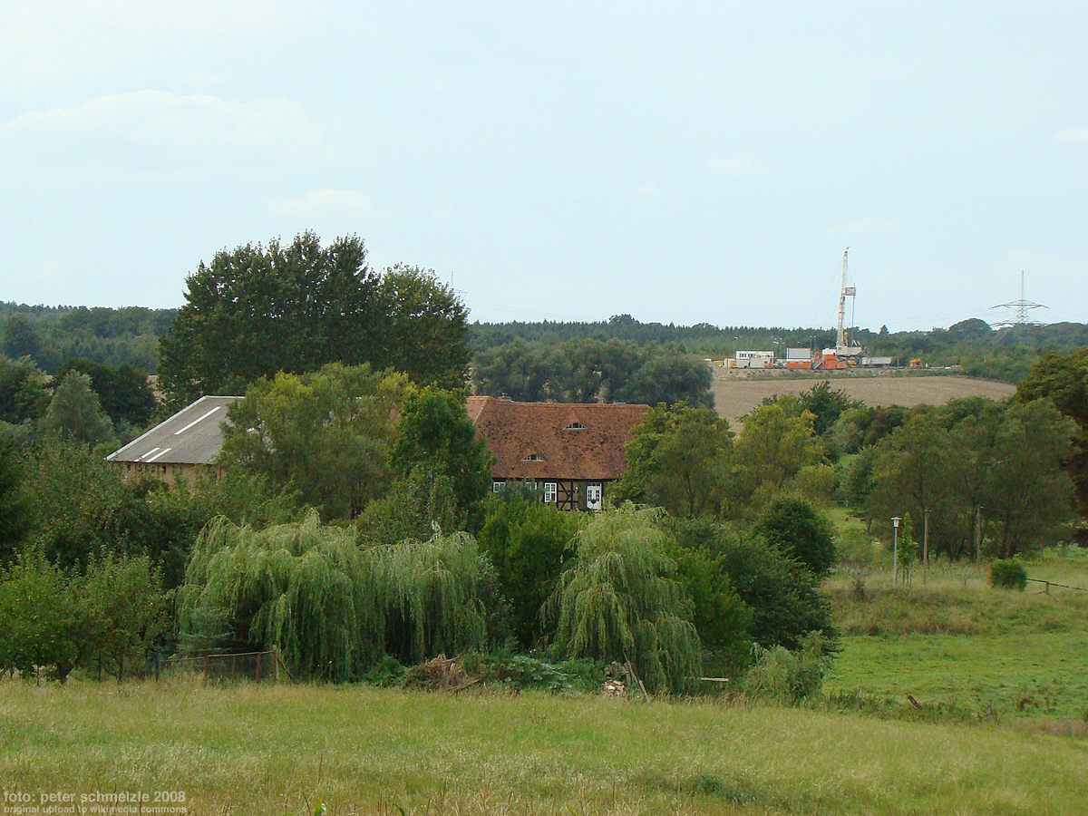 Hinrichshagen, mit Gazprom-Probebohrung für geplanten Erdgasspeicher